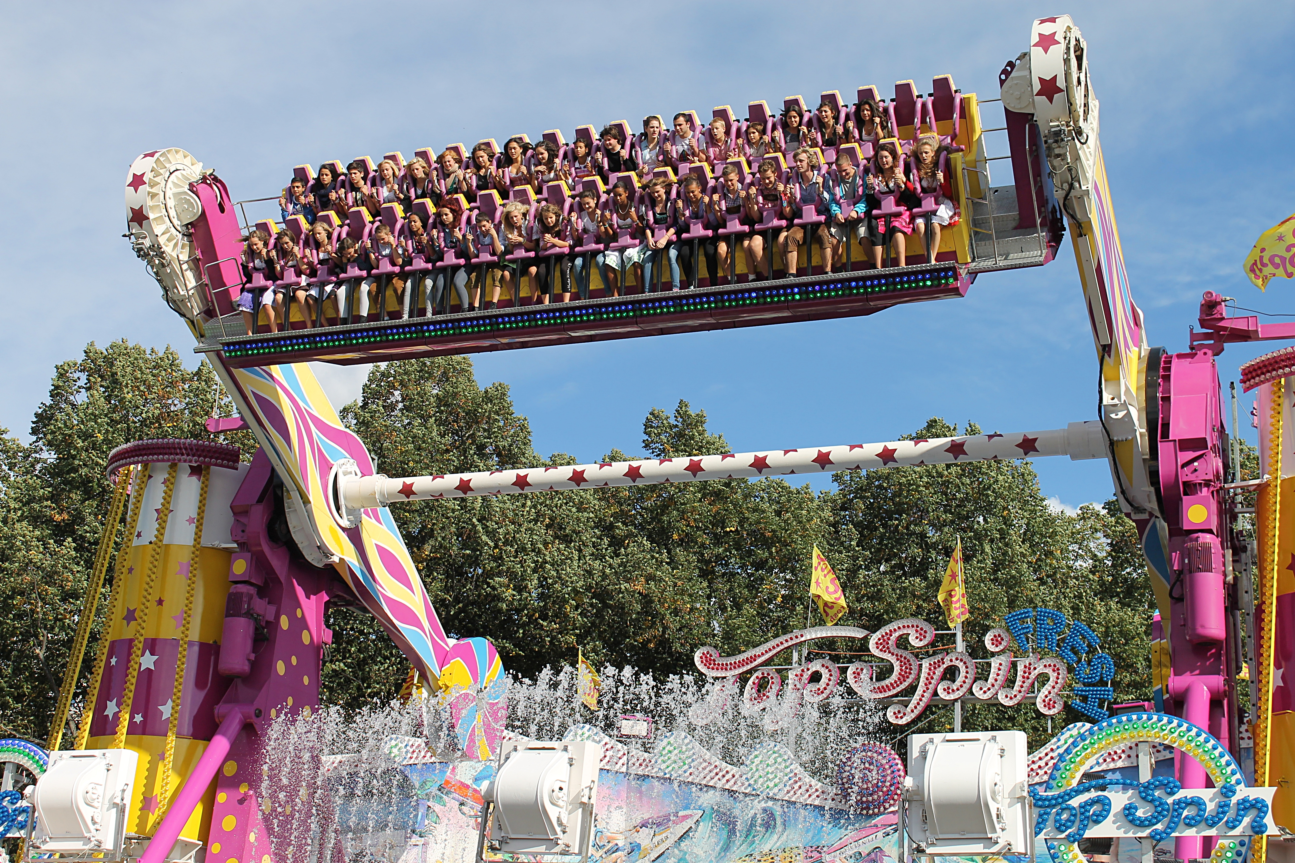 Pendant qu’à l’intérieur des tentes, les visiteurs boivent et mangent sans répit, la fête bat aussi son plein à l’extérieur. Une immense fête foraine est installée dans le pré, avec montagnes russes, manèges en tous genres, autos tamponneuses et train fantôme.